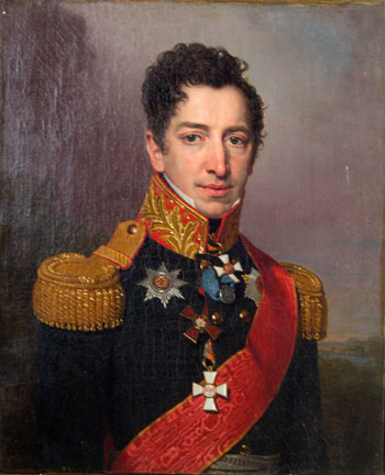 Кикин, Пётр Андреевич (1775-1834) Новочеркасский музей истории донского казачества.